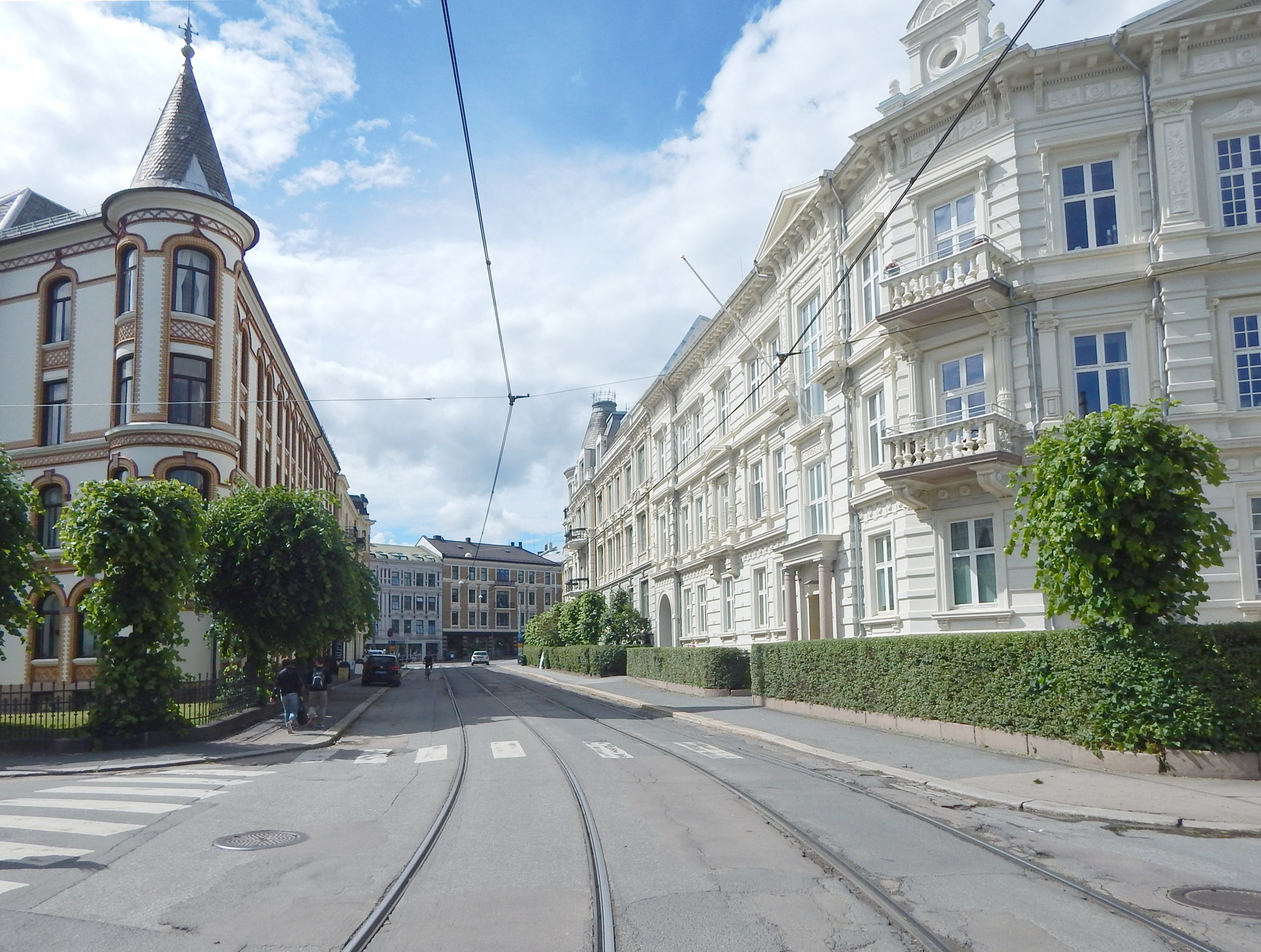 Riddervolds gate mot Riddervolds plass